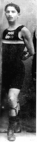 Dragutin Tomašević (Драгутин Томашевић) (1890 – 1915) è stato un atleta e ginnasta serboha gareggiato al i Giochi olimpici estivi - 1912 a Stoccolma.